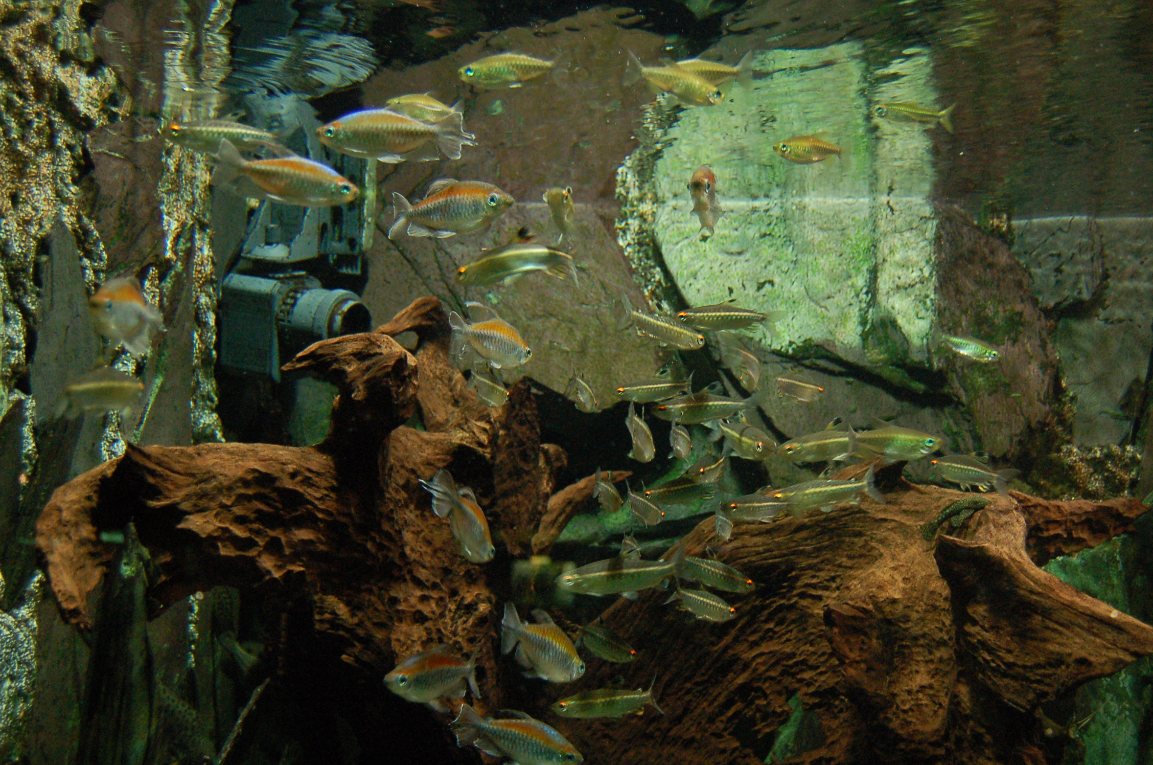 Tétra du Congo - Phenacogrammus interruptus Aquarium tropical du Palais de la Porte Dorée. Paris. France.